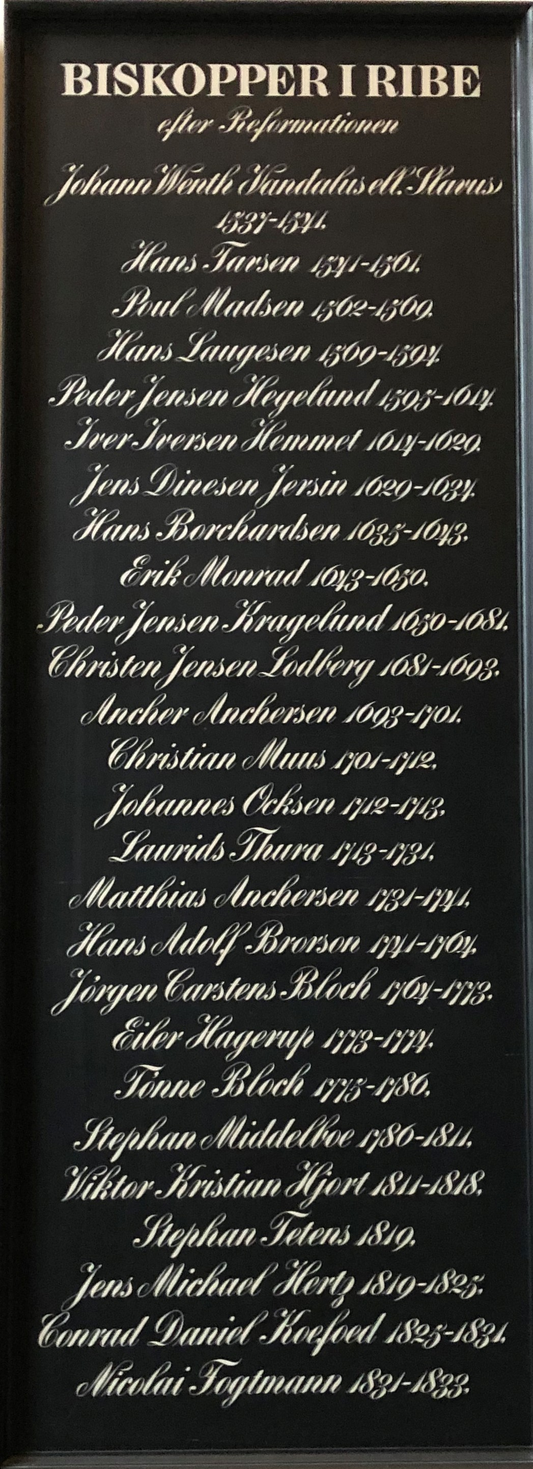 Bisperække-tavle i Ribe Domkirke over biskopper i Ribe efter Reformationen i Danmark